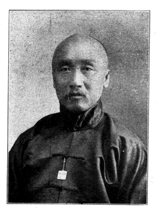 中文（台灣）: 中華民國國會議員